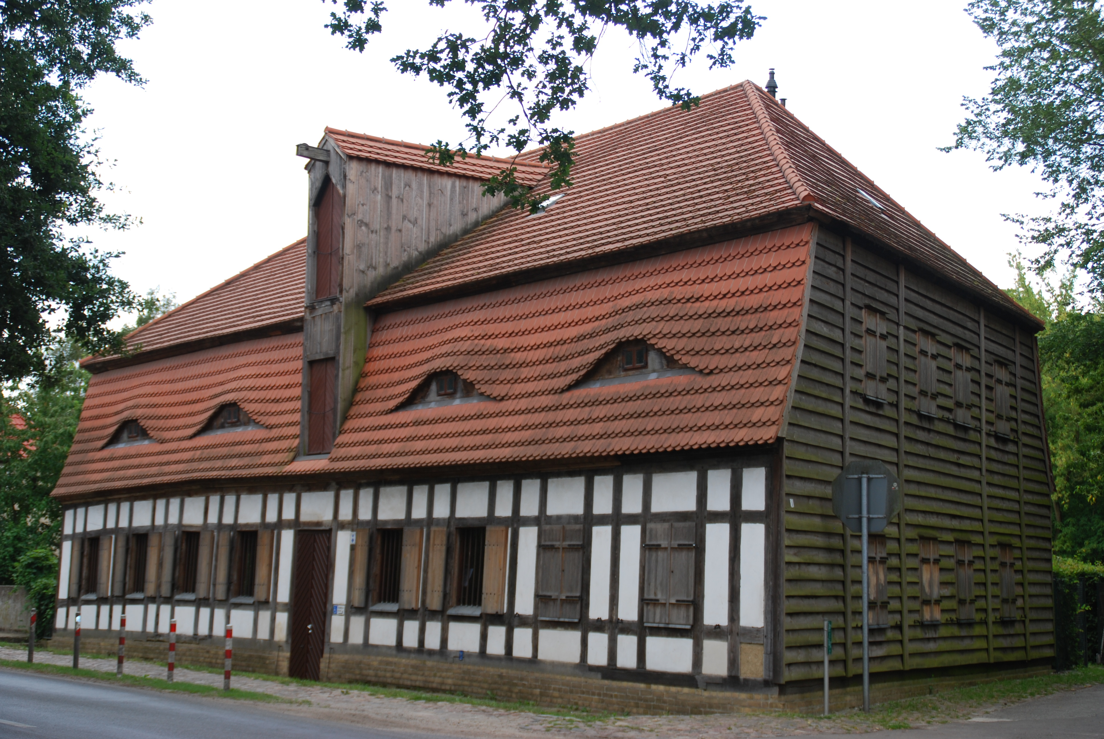 Rauhfutterspeicher Schöneiche